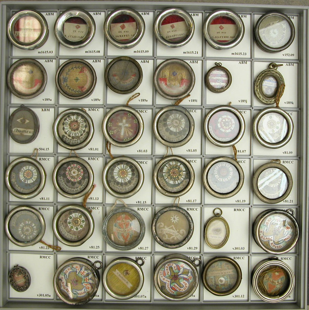 Reliekmedaillons met relieken van Clara en een echtheidsverklaring, en van Margaretha Maria Alacoque 19e eeuw RMCC v81.1, 2 en 11 De eenvoudige ronde medaillons, zogenaamde theca’s, worden in platte kasten gestoken en zo aan de gelovigen ter verering getoond.